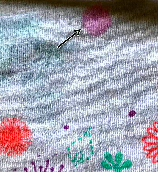 Kindershirt mit Fleck